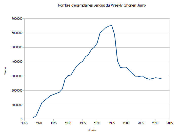 Ventes du Weekly Shōnen Jump